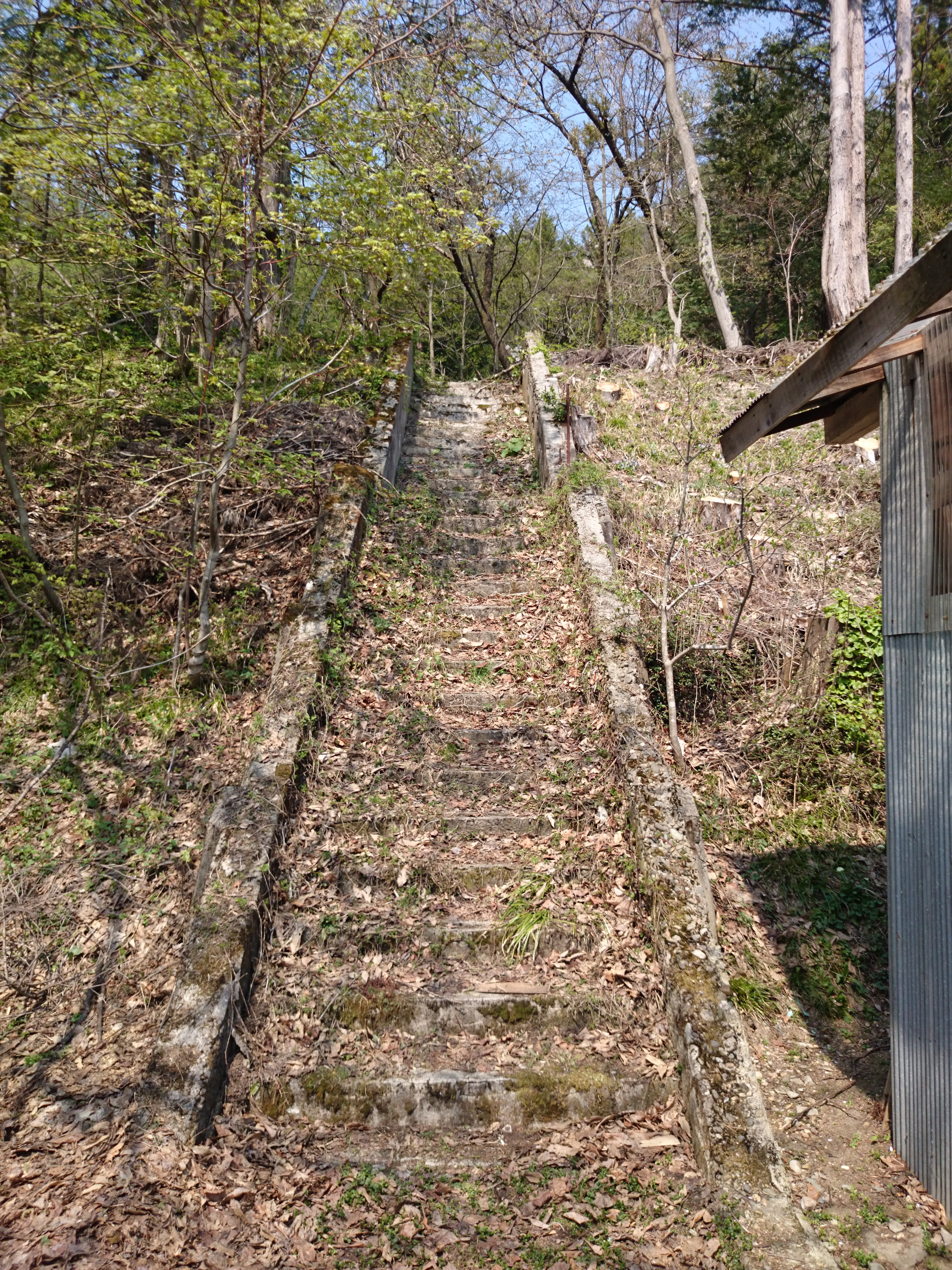 橋場駅階段跡